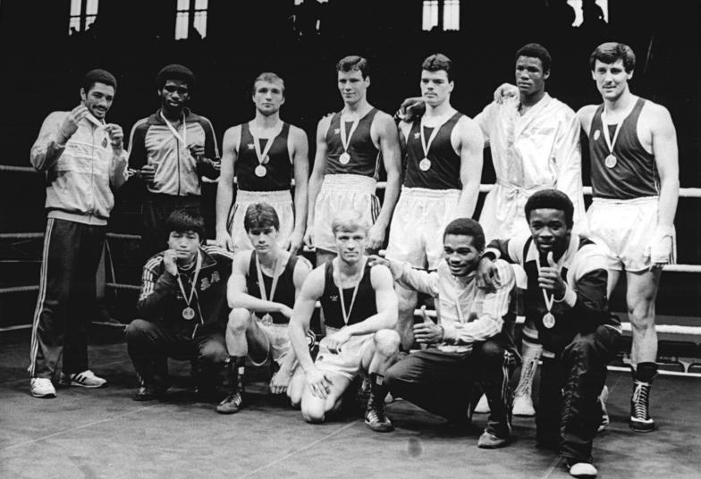 Halle/Saale, XIV. Internationales Chemie-Pokal-Turnier, Boxer ADN-ZB Lehmann 31.3.85 Halle: XIV. Internationales Chemie-Pokal-Turnier-In den Finalkämpfen siegten: Jesus Sollet (Kuba, Federgewicht), Jose Luis Hernandez (Kuba, Weltergewicht), Michael Timm (DDR, Halbmittelgewicht), Henry Maske (DDR, Mittelgewicht), Rene Suetovius (DDR, Halbschwergewicht), Felix Savon (Kuba, Schwergewicht) , Sergej Kormilizyn (UdSSR, Superschwergewicht) - hintere Reihe vlnr: Kim Tschan Rim (KDVR, Halbfliegengewicht), Dieter Berg (DDR, Fliegengewicht), Klaus-Dieter Kirchstein (DDR, Bantamgewicht), Carlos Garcia (Kuba, Halbweltergewicht), Adolfo Horta (Kuba, Leichtgewicht) - vordere Reihe vlnr